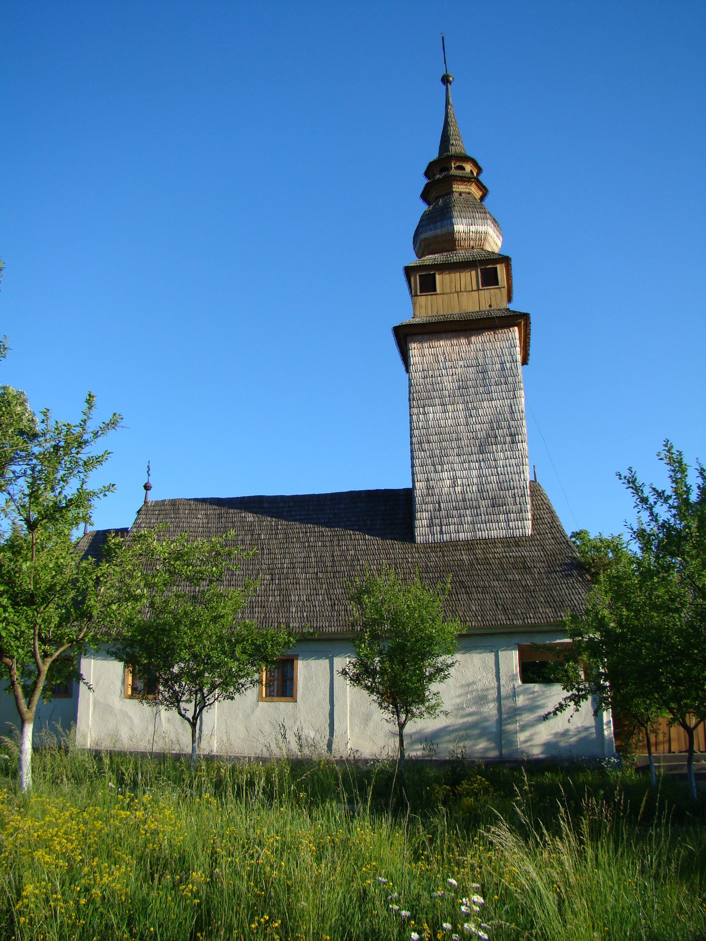 Biserica de lemn din Valea Chioarului, Maramureş, România